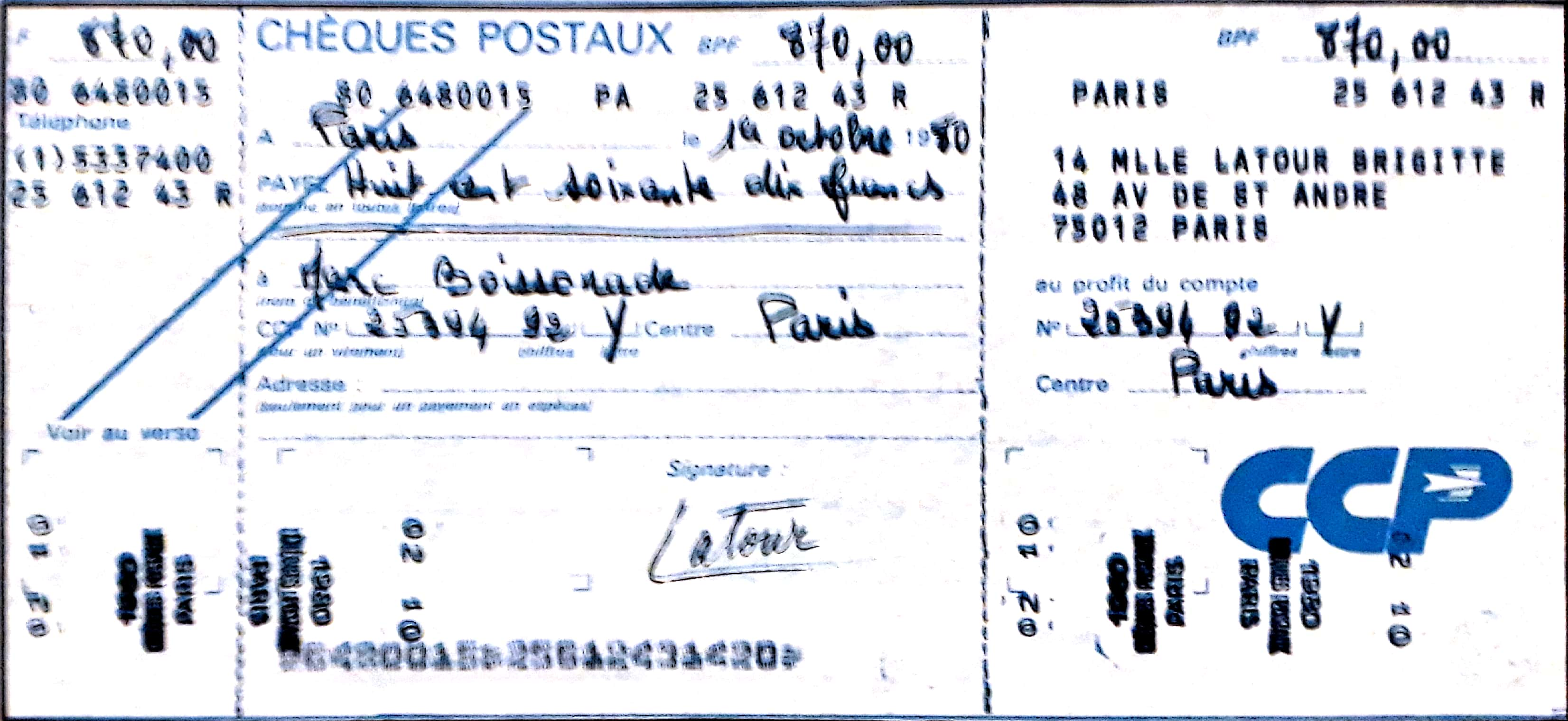 Image d'un chèque postal (fac-similé non valide émanant d'un manuel de formation)